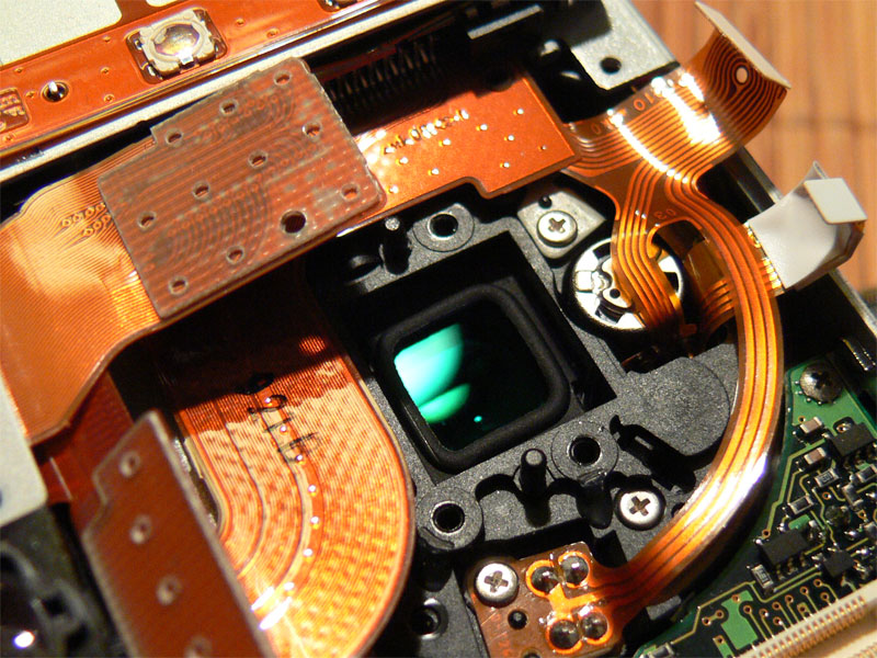 Canon Powershot G1 típusú fényképezőgép eltávolításra váró infratükre. A gép hátulnézetben látható, a CCD közvetlenül az infratükör mögött helyezkedett el